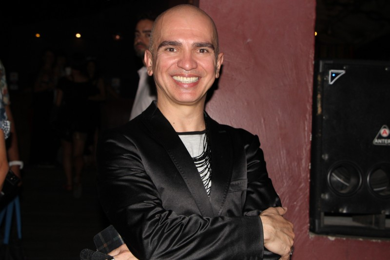 Edson Cordeiro-038